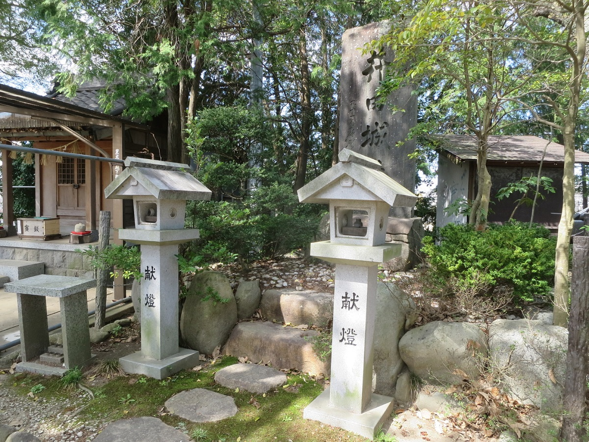 井田城跡（岡崎市井田町）